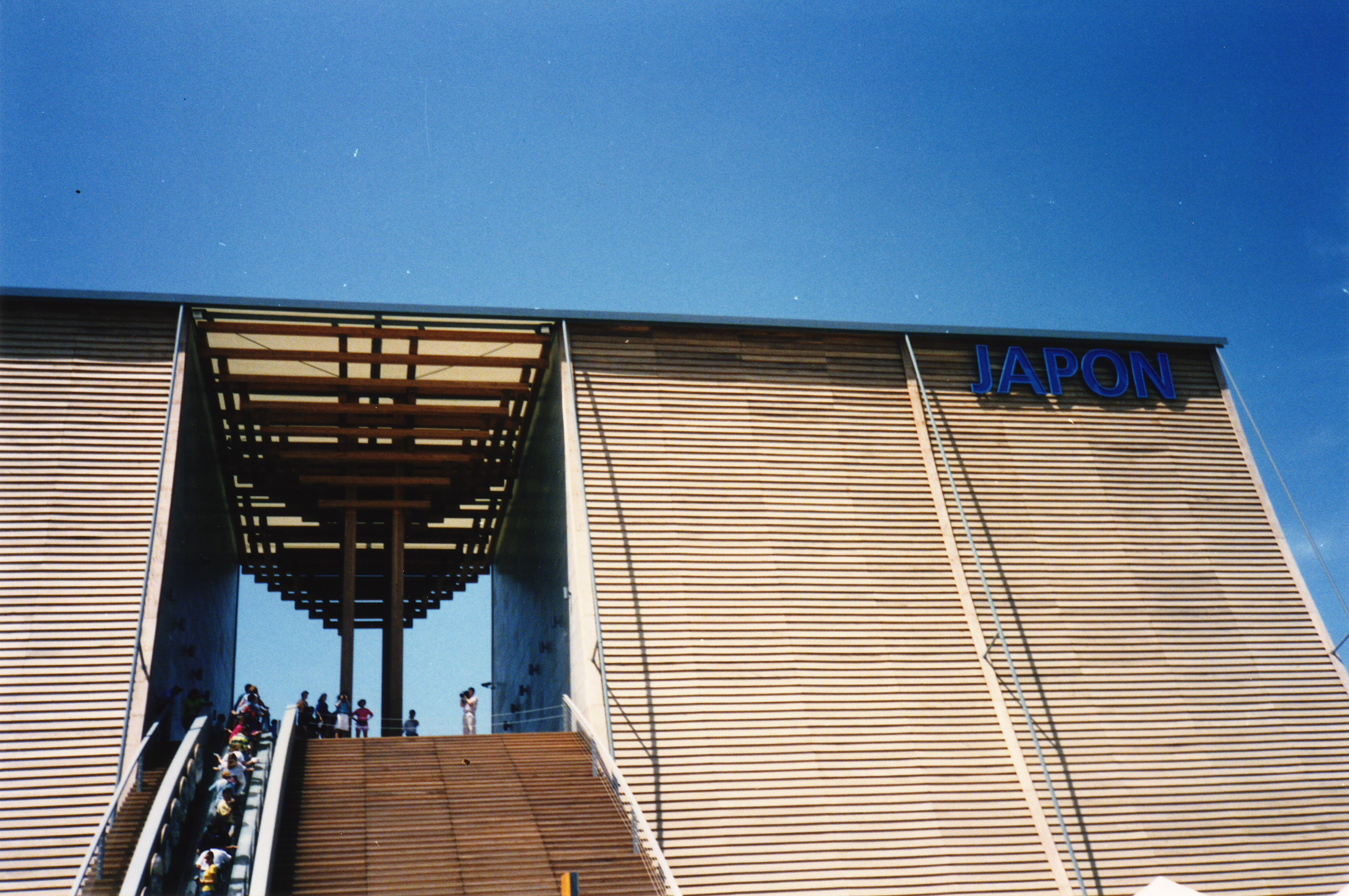 Exposición Universal Sevilla 92. Exterior del pabellón de Japón. Viaje en AbrilImage0018